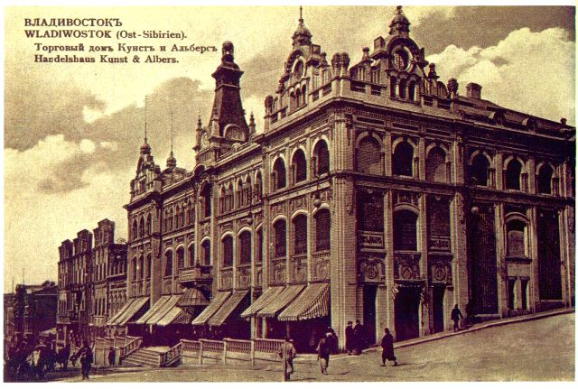 Kunst&Albers store